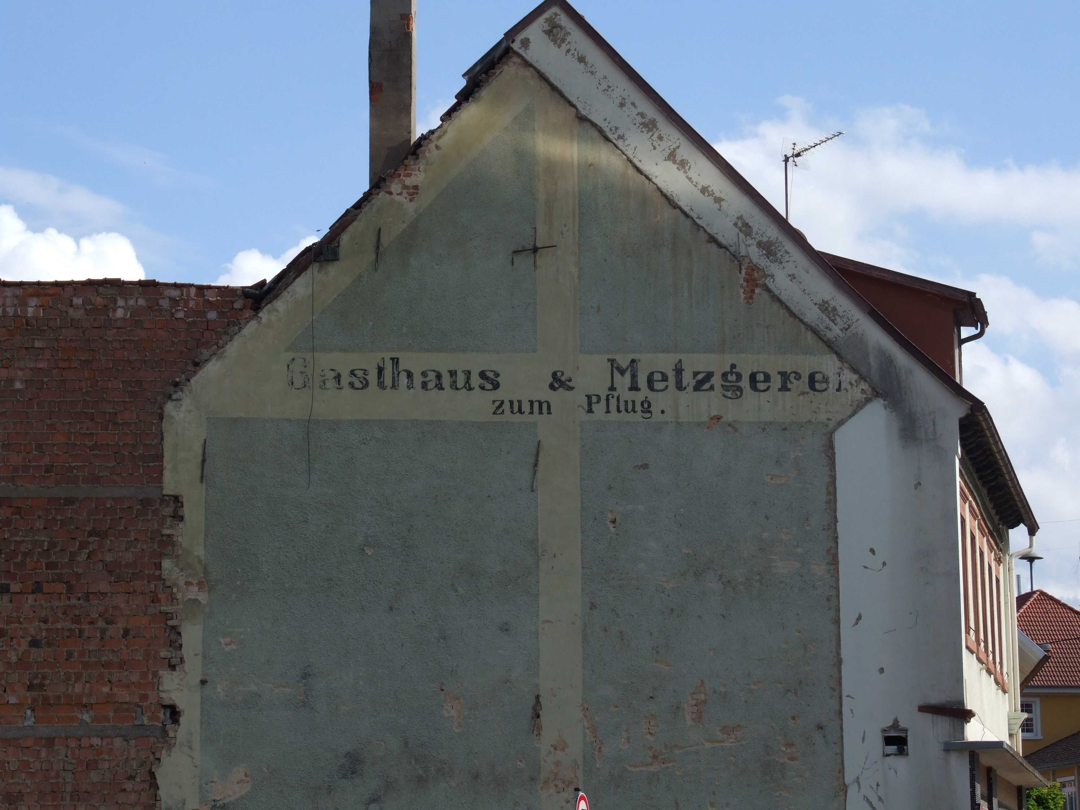 Ehemaliges Gasthaus und Metzgerei zum Pflug in Eschelbronn